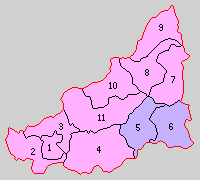 兵庫県美嚢郡の町村制時点の町村。